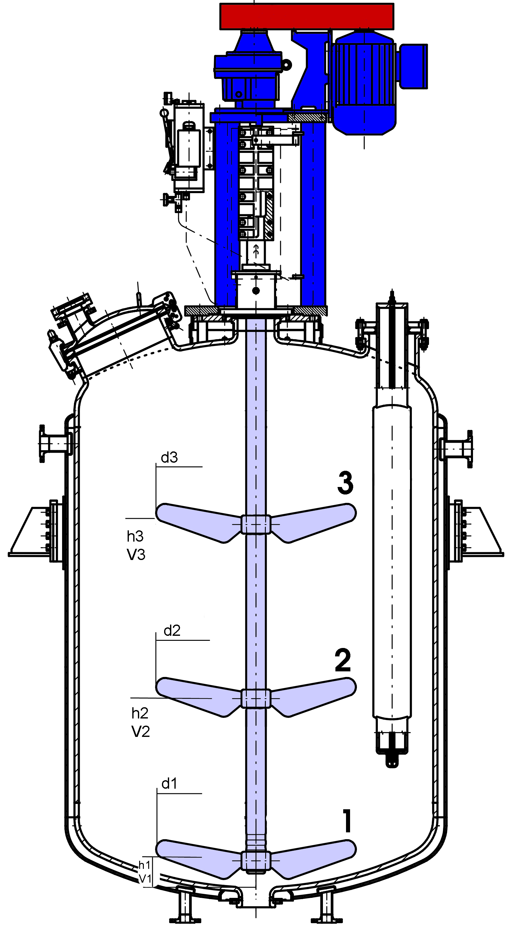 Rührwerksbehälter emailliert